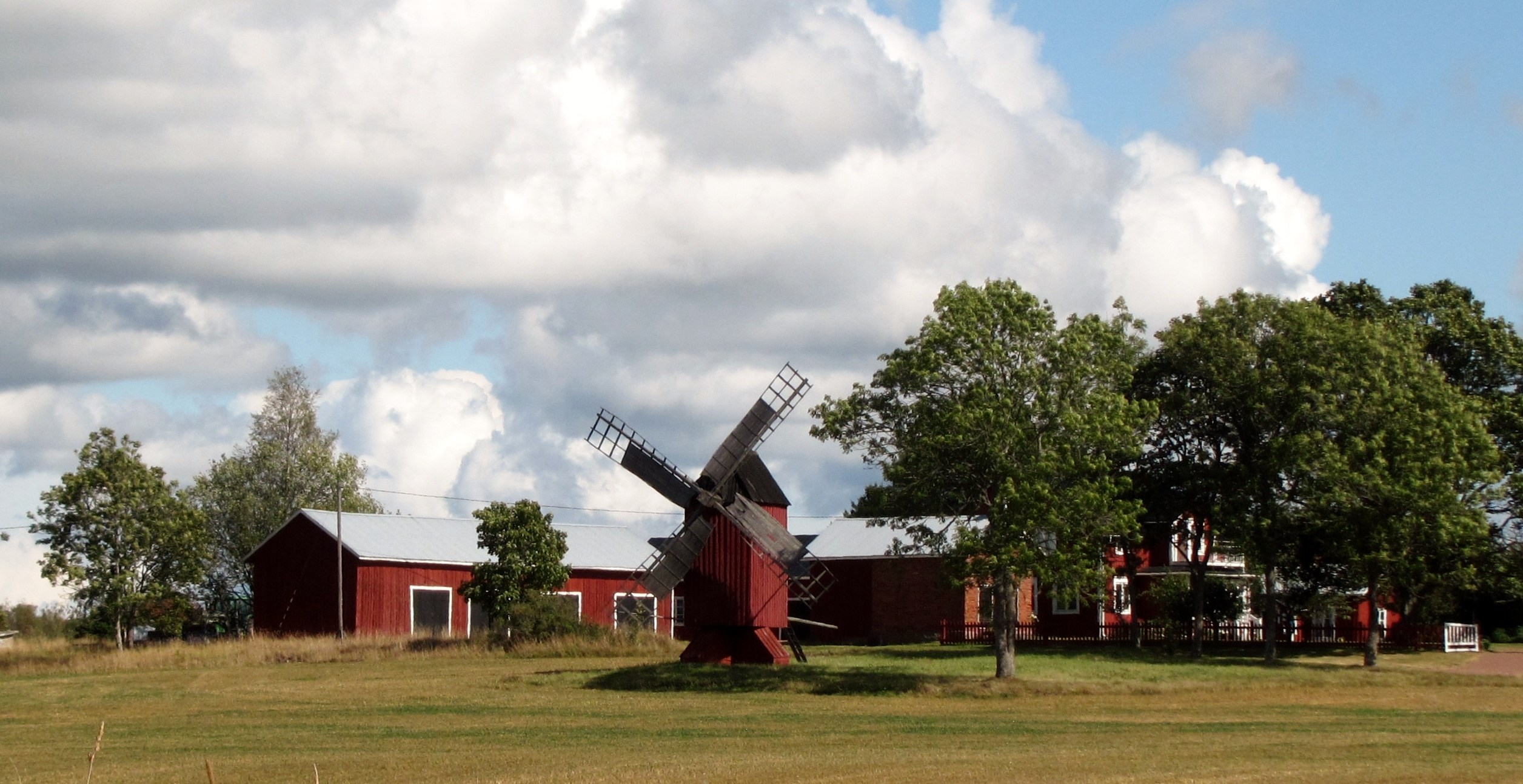 Windmühle, Björsby, Gemeinde Jomala, Fasta Aland, Finnland